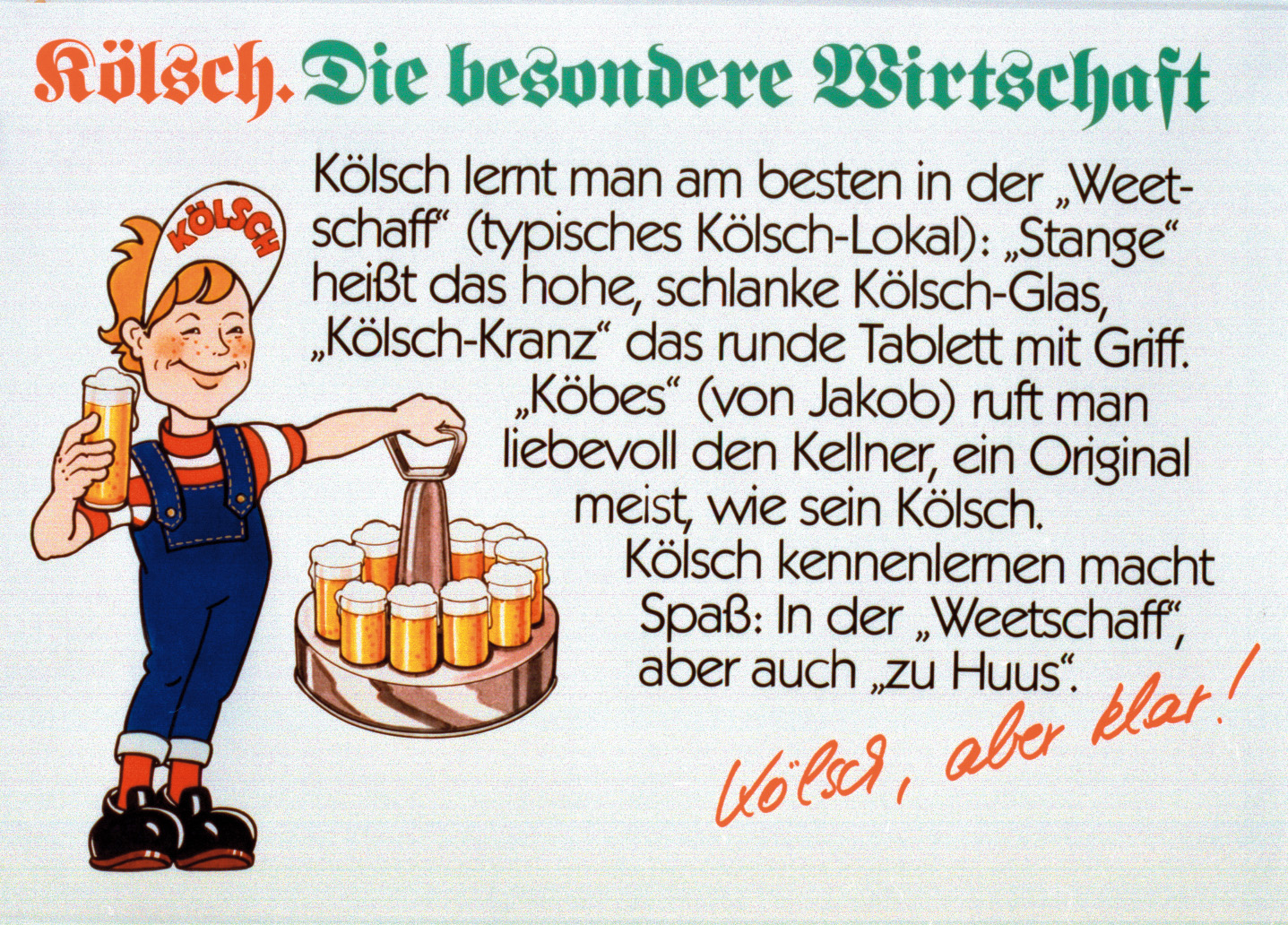 Ein Kölsch-Werbeplakat der Privatbrauerei Gaffel Becker & Co